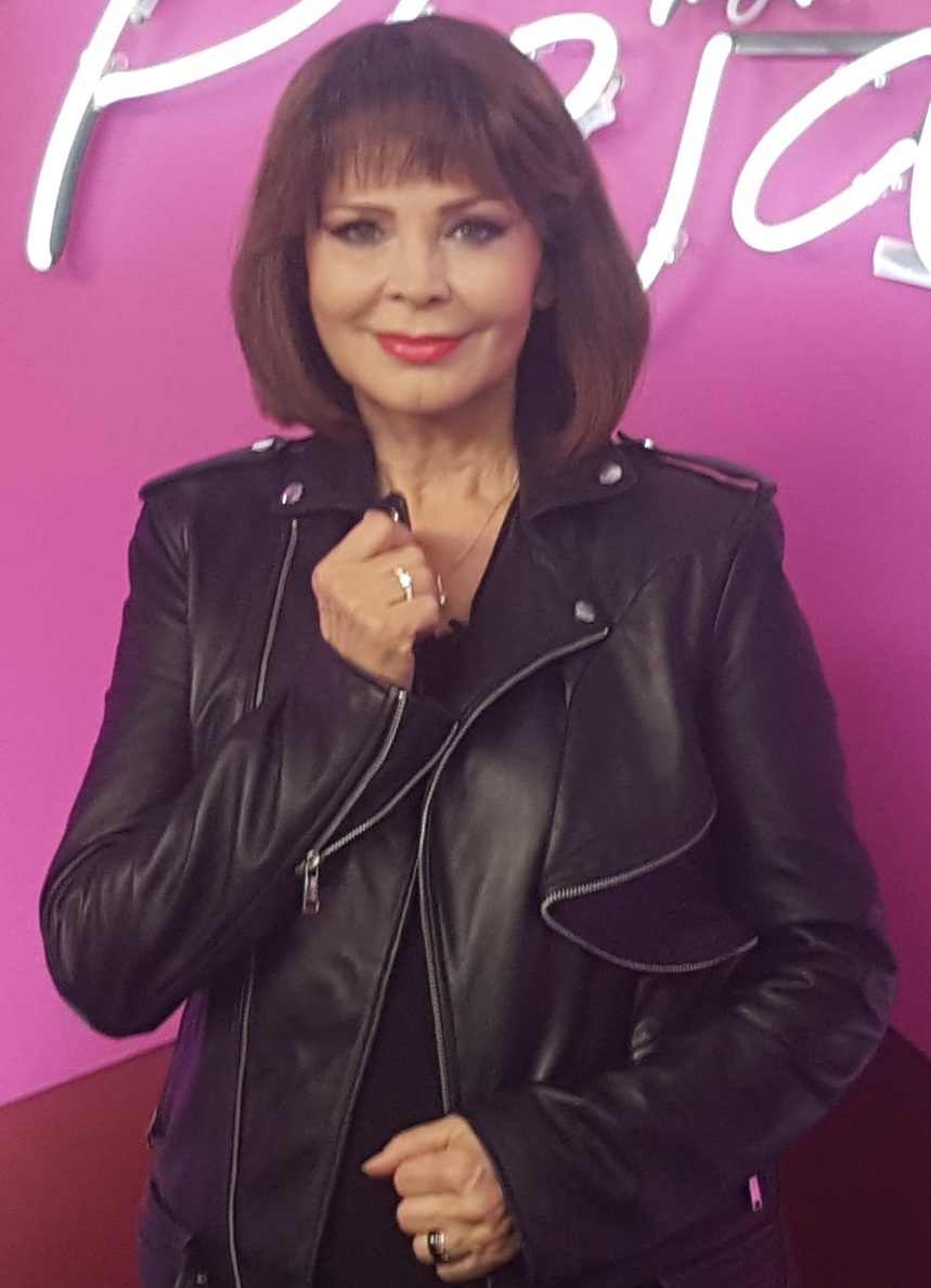 Polska piosenkarka Izabela Trojanowska na planie programu "Gwiazdy Cejrowskiego", maj 2017.